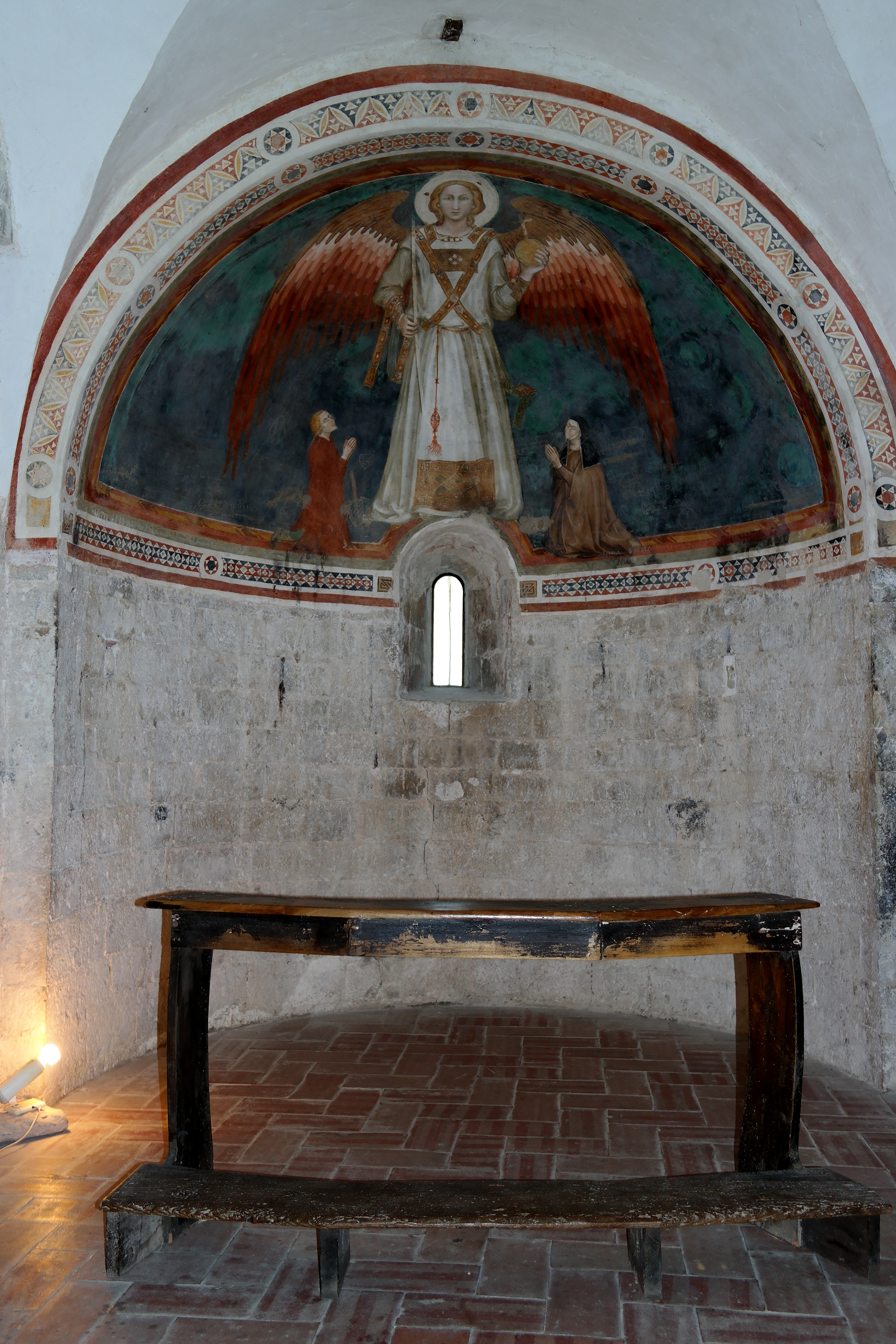 Affreschi nella cripta della Chiesa di San Ponziano a Spoleto: nel catino absidiale della navata destra, San Michele Arcangelo